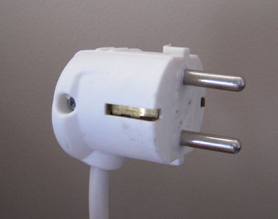 Elektrisk støpsel (230 V) med jord.